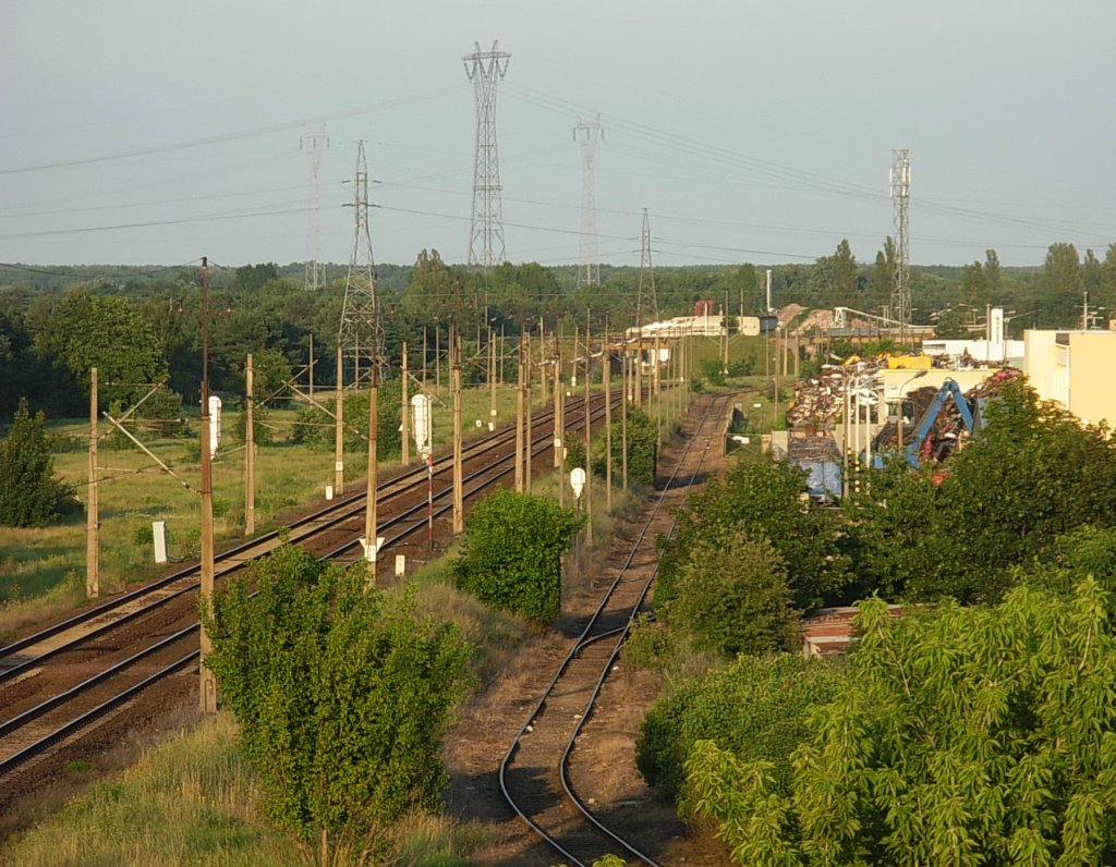 Linia kolejowa nr 18 Bydgoszcz-Toruń, widok z wiaduktów warszawskich w Bydgoszczy